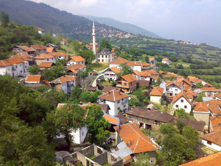 Urvič, Makedonija. Autor: Samet Ragipi.